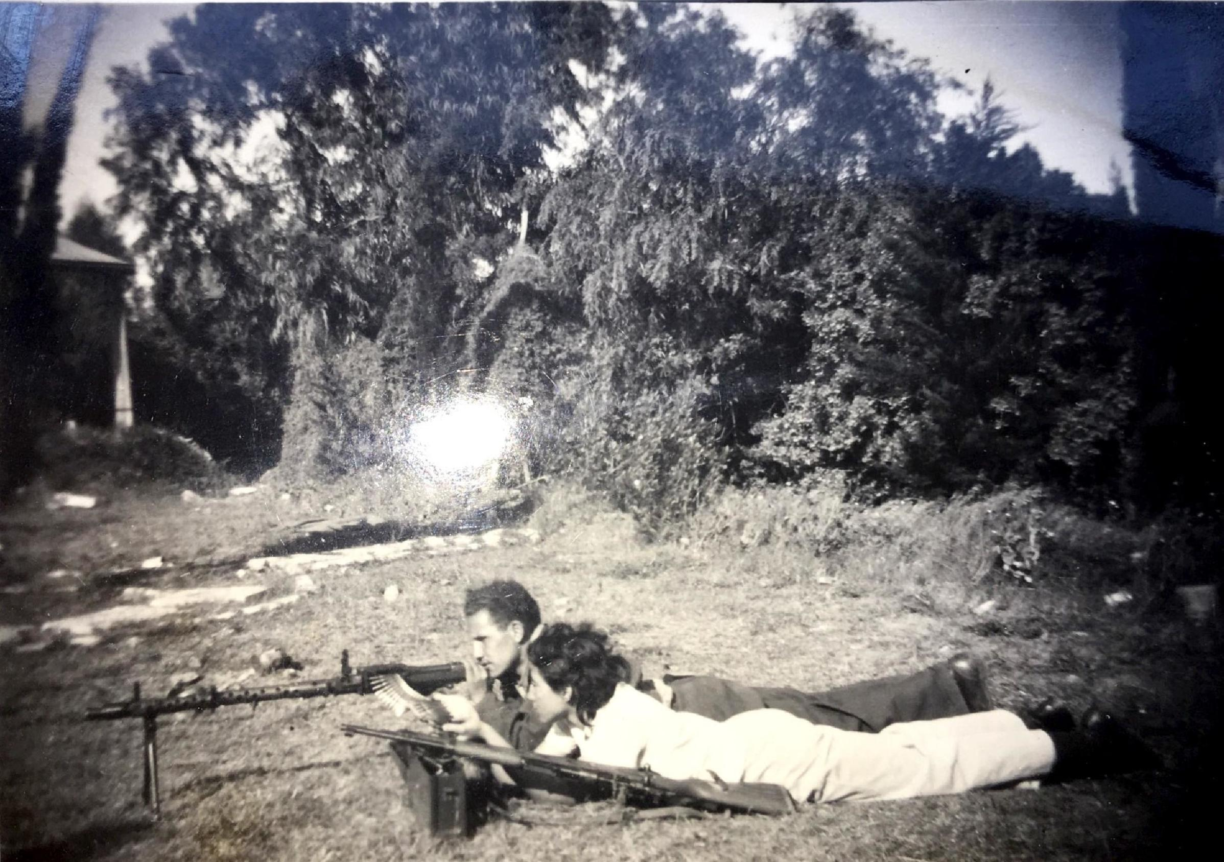 צפורה נריה אימון ירי - פלמ"ח